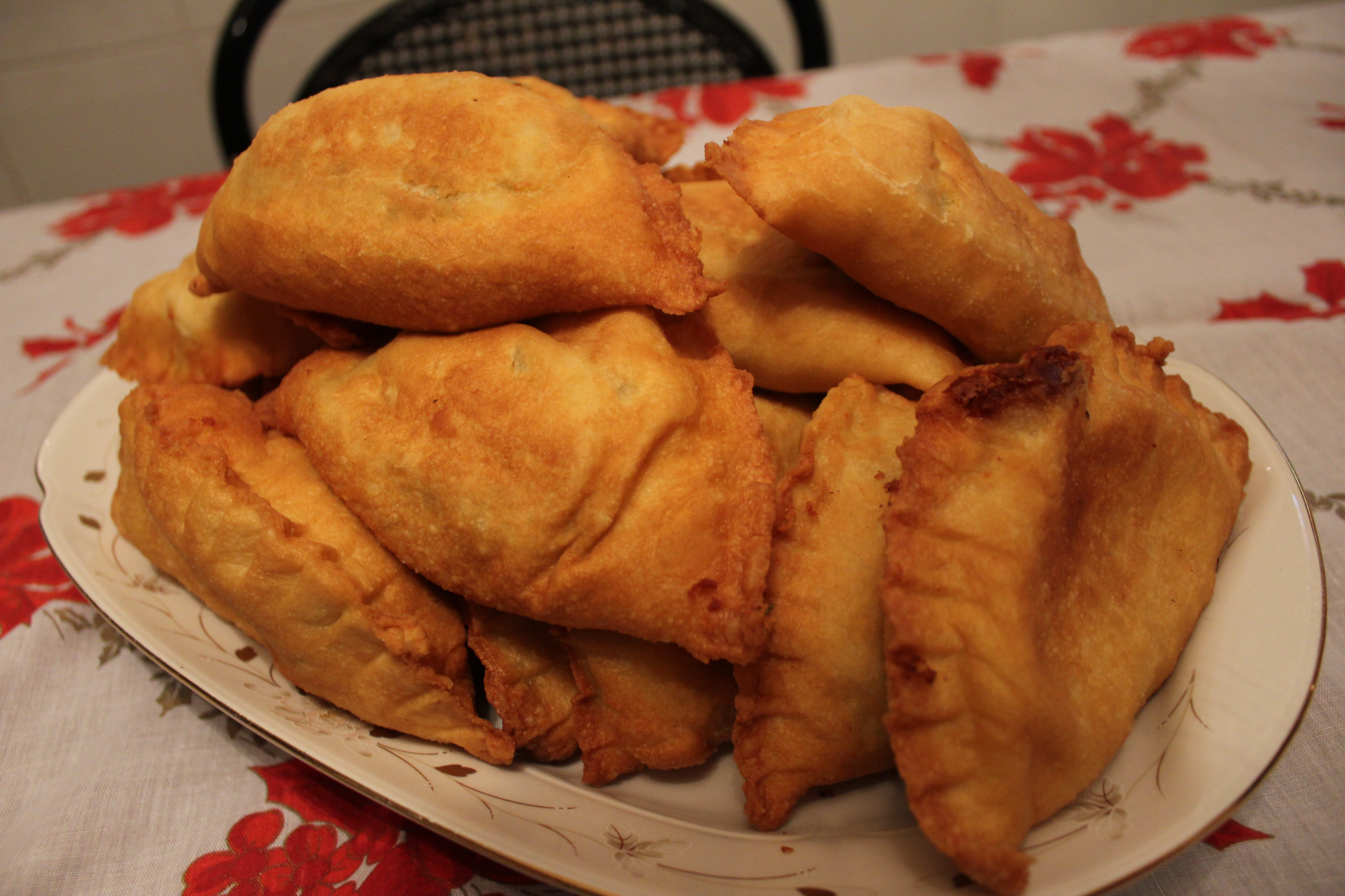 Pidoni